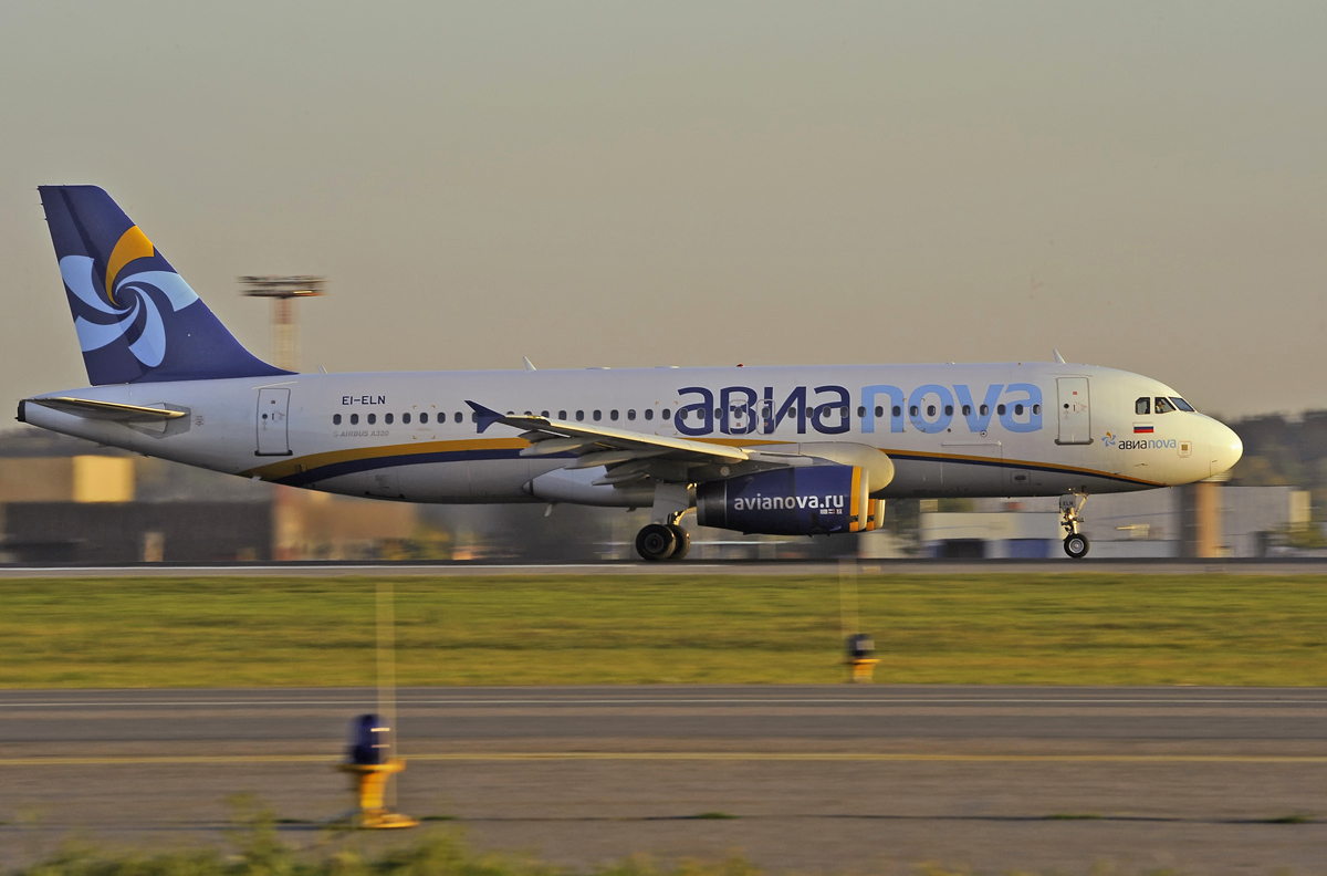 "Avianova" A-320 EI-ELN